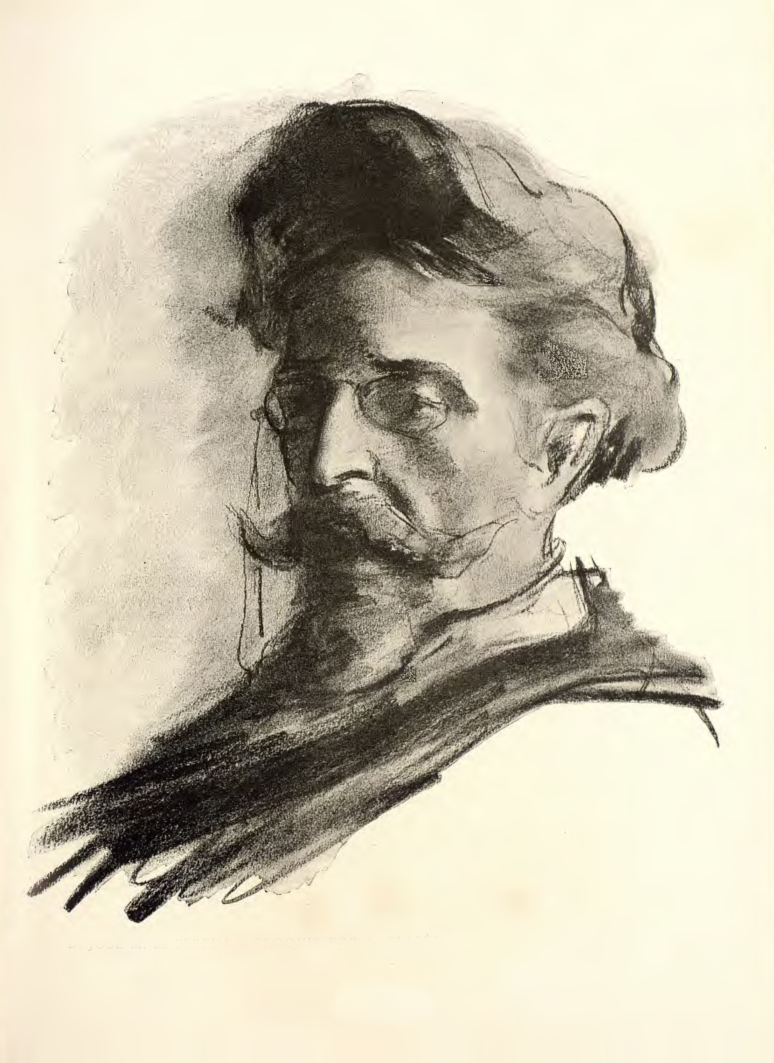 José María de Pereda. Croquis por A. Clapés.